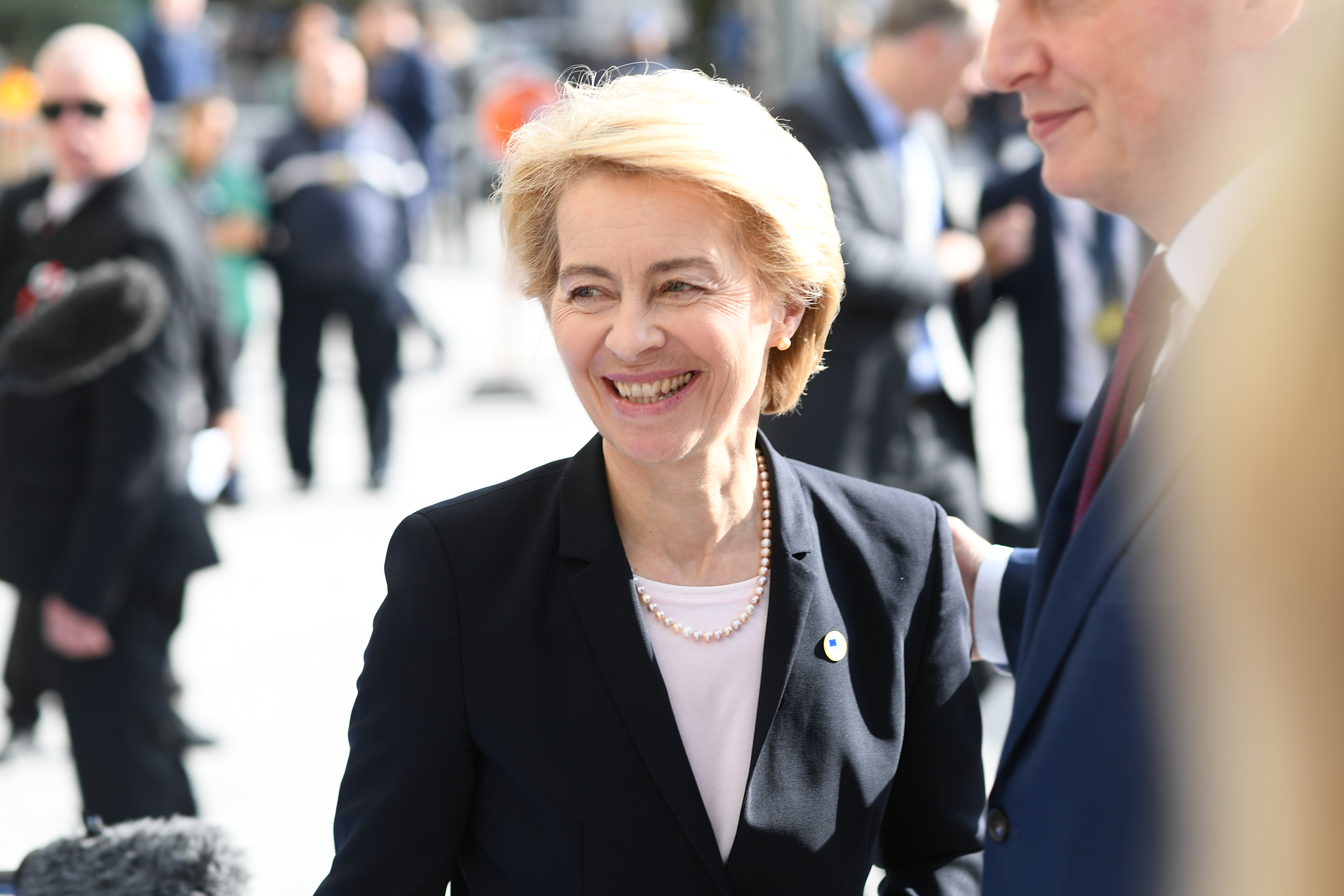 EPP Summit, Brussels, 17 October 2019